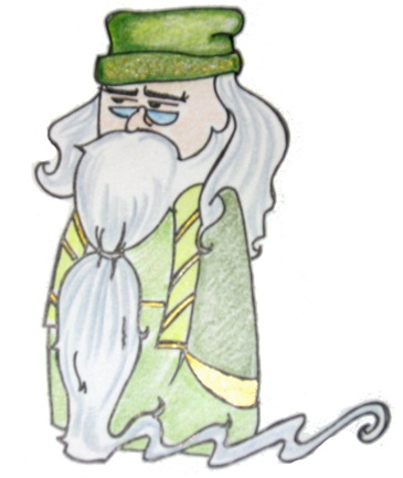 Rappresentazione di Albus Silente. L'autrice (M. Mazzanti) rilascia l'immagine libera per il pubblico dominio.